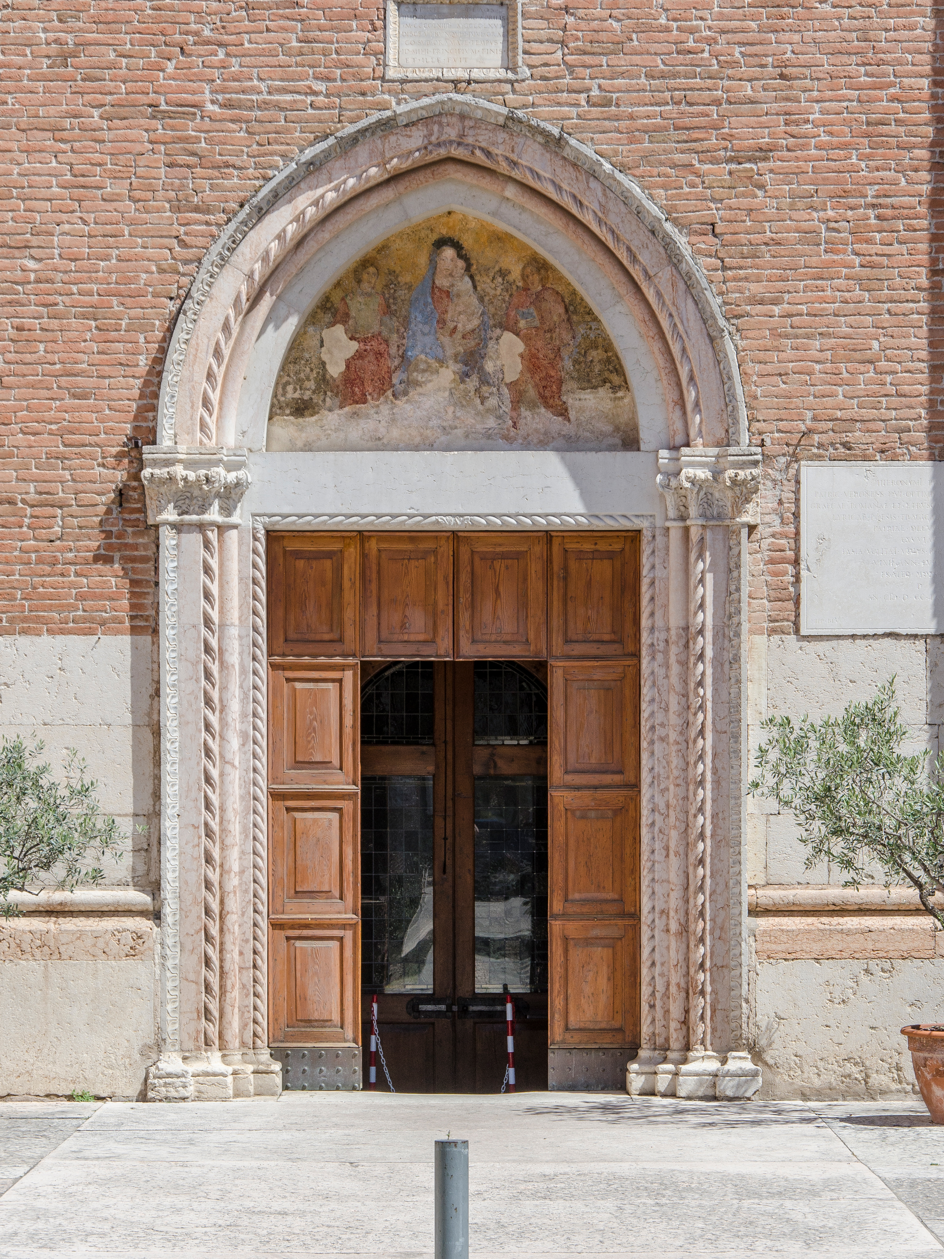 Chiesa dei Santi Nazaro e Celso a Verona. Esterno.